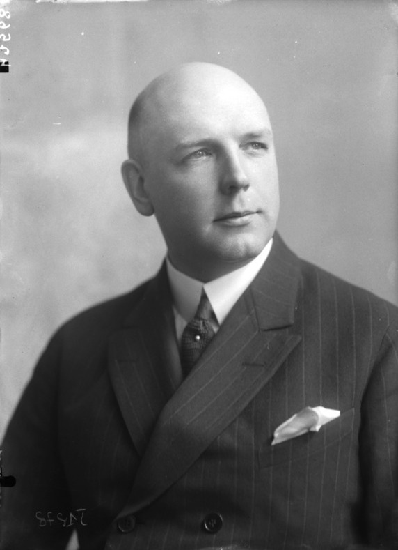 Allan Hjelt fotografato da Mario Nunes Vais